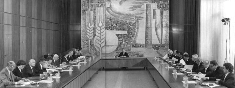 ADN-ZB Mittelstädt-25.6.81- Berlin: Erste Sitzung des Staatsrates. Der von der Volkskammer der DDR neugewählte Staatsrat trat zu seiner ersten Sitzung zusammen.